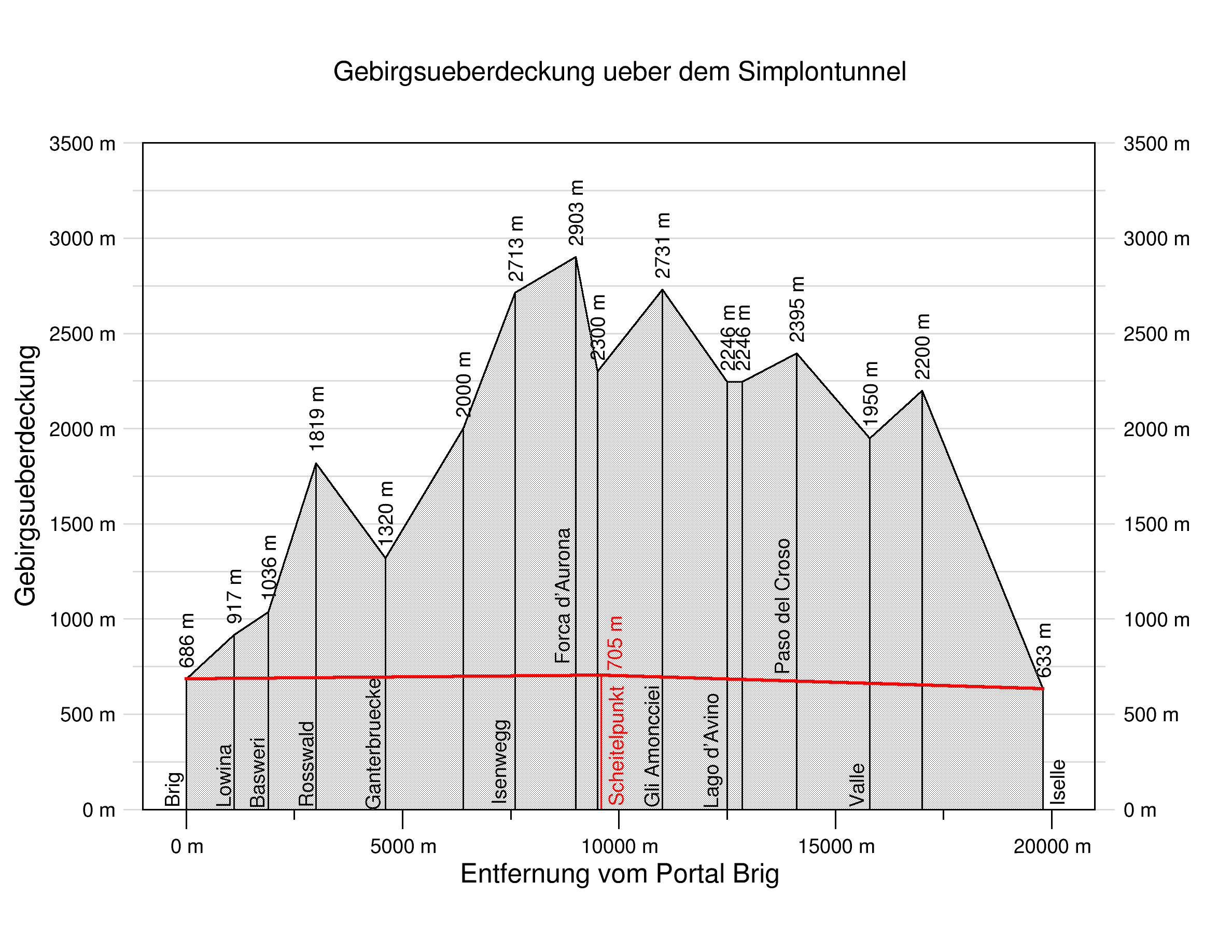 Gebirgsüberlagerung über dem Simplon-Eisenbahntunnel in der Schweiz und in Italien